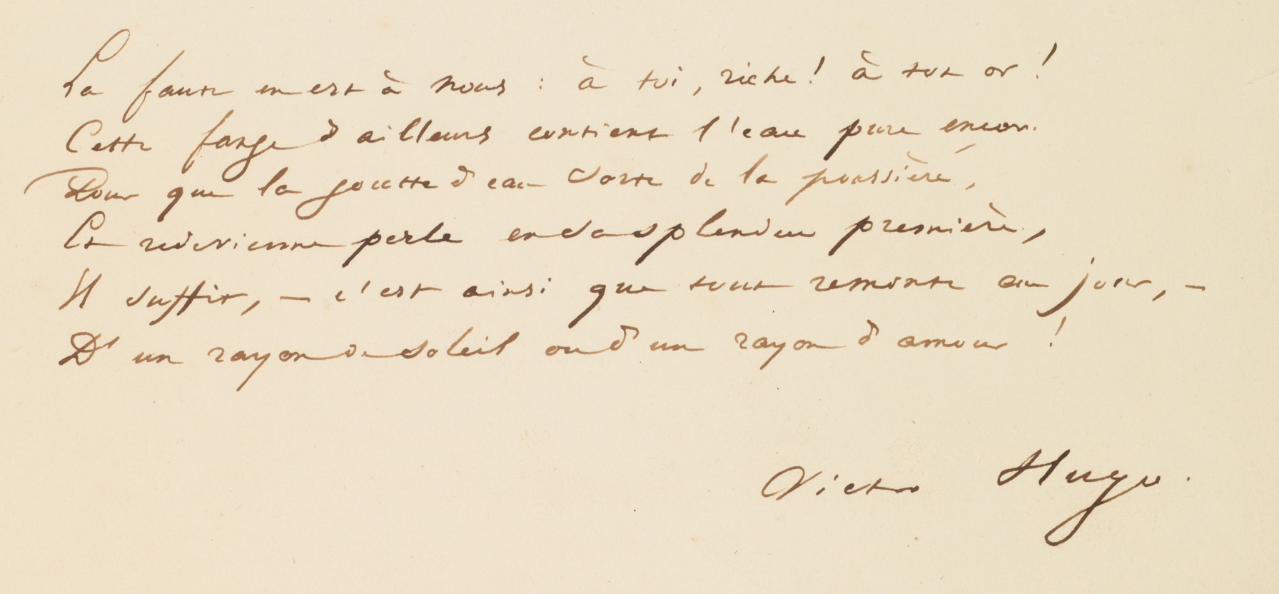 Extrait du poème "Oh ! n'insultez jamais une femme qui tombe !...", paru dans "Les chants du crépuscule"; Paris, 1841. Actuellement conservé au sein de la Fondation Martin Bodmer.